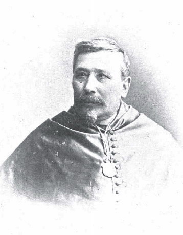 Josep Ramon de Luanco Riego (Castropol (Astúries), 14 de novembre de 1825 - 5 de maig de 1905), químic, historiador de la ciència, Rector de la Universitat de Barcelona